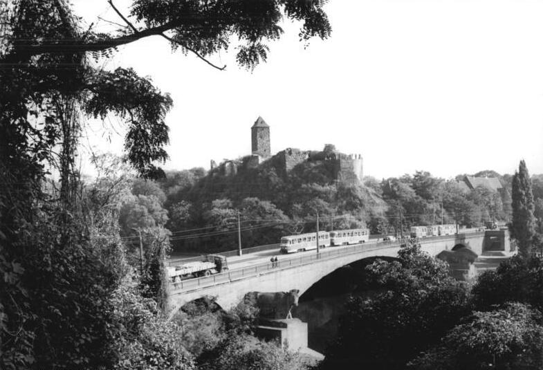 Halle, Burg Giebichenstein, Kröllwitzer Brücke ADN-ZB Lehmann 12.10.83 Halle: Die Hochschule für industrielle Formgestaltung Burg Giebichenstein feiert dieser Tage ihr 25jähriges Bestehen. In dem Vierteljahrhundert ihres Bestehens entwickelte sich die "Burg", die früher die Städtische Handwerkerschule der Saalestadt beheimatete, zu einer profilierten Lehreinrichtung zur Ausbildung von Formgestaltern. Über die Hälfte der bei Leipziger Messen vergebenen Auszeichnungen "Gutes Designs" erhielten formgestalterische Lösungen von Absolventen dieser Schule. - siehe 7n-8n